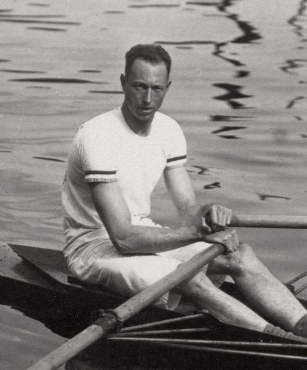 Olympische Spelen Antwerpen 1920. Roeien: één van de deelnemers in de skiff, de Nederlander Frits Eyken.